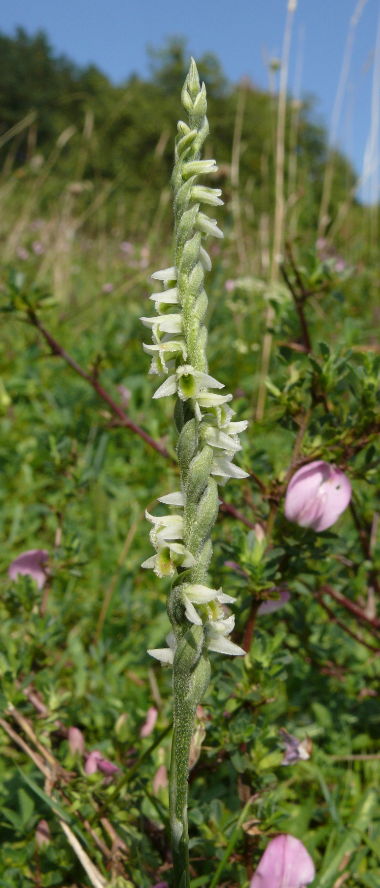 Spiranthes spiralis, Frankenhöhe, Germany